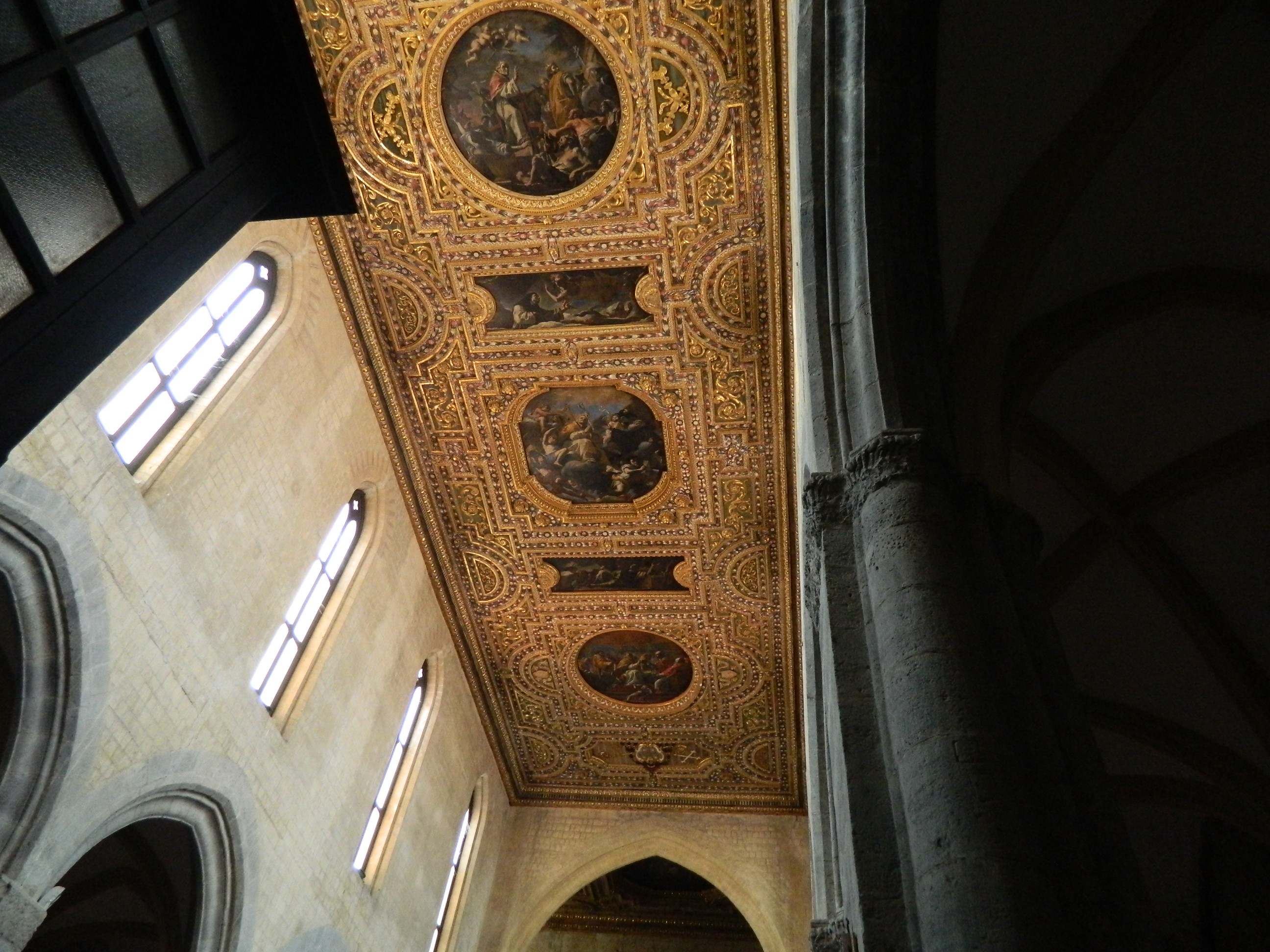 Chiesa di San Pietro a Majella (Napoli) - Soffitto con dipindi di Mattia Preti